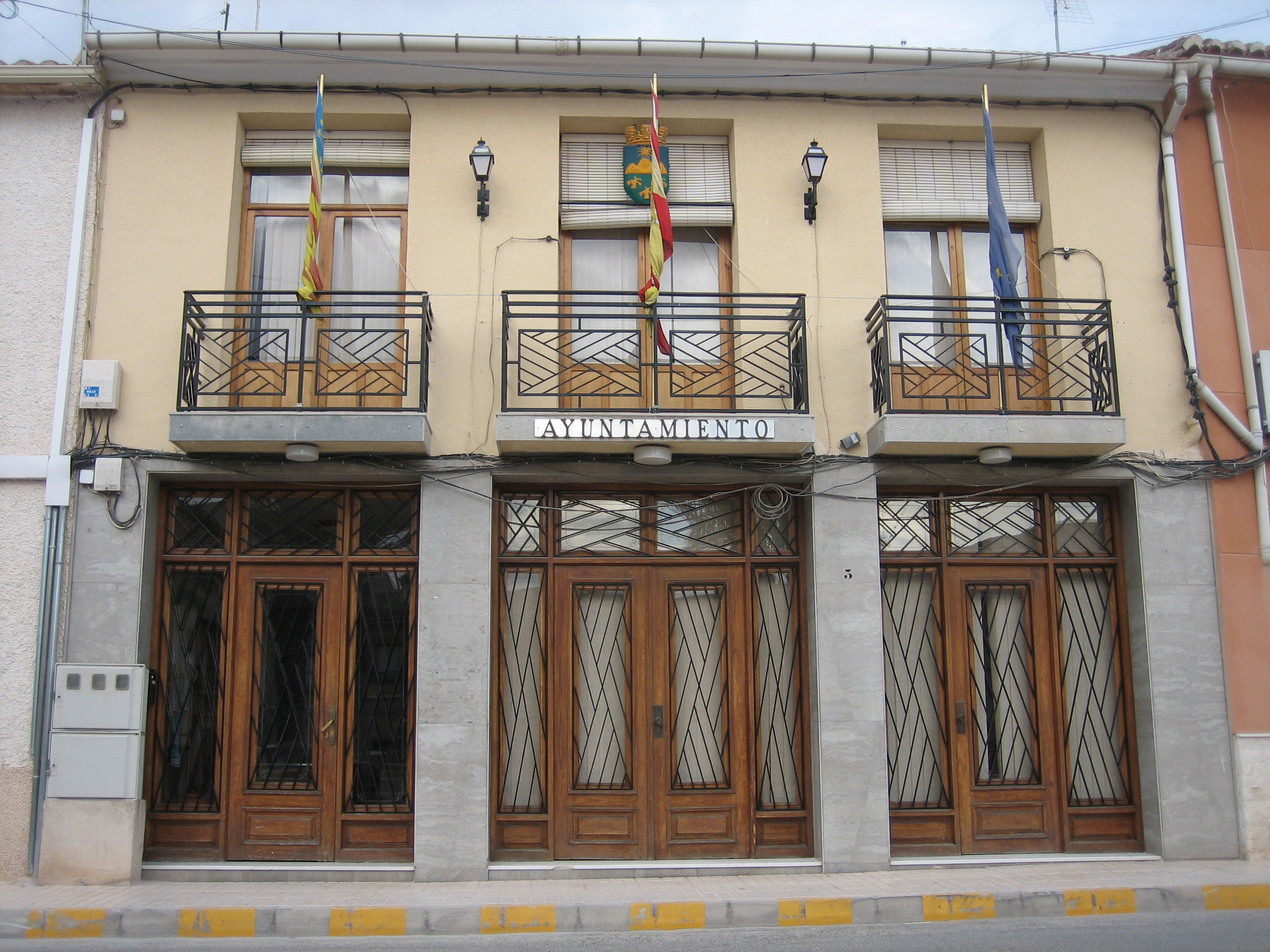 Ayuntamiento de Algueña Ayuntamiento de Algueña (Alicante, España). Fotografía realizada por Rodriguillo el 24/03/2006.